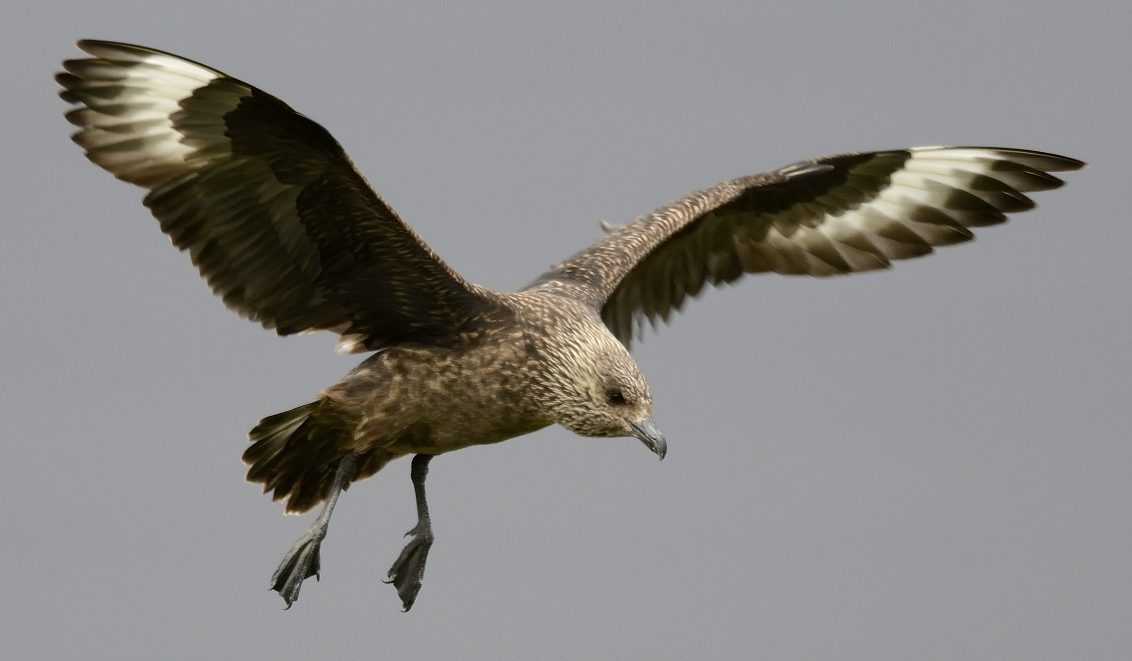 Great Skua (Stercorarius skua)